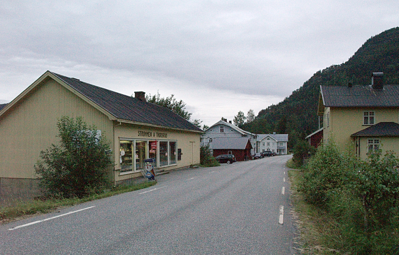 The small village Sørum in Sør-Aurdal, Norway